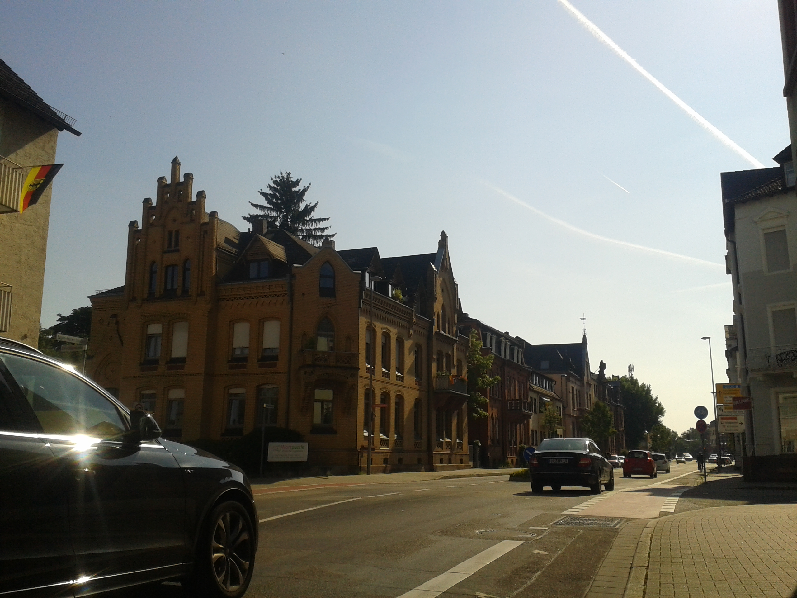 Wilhelmstraße